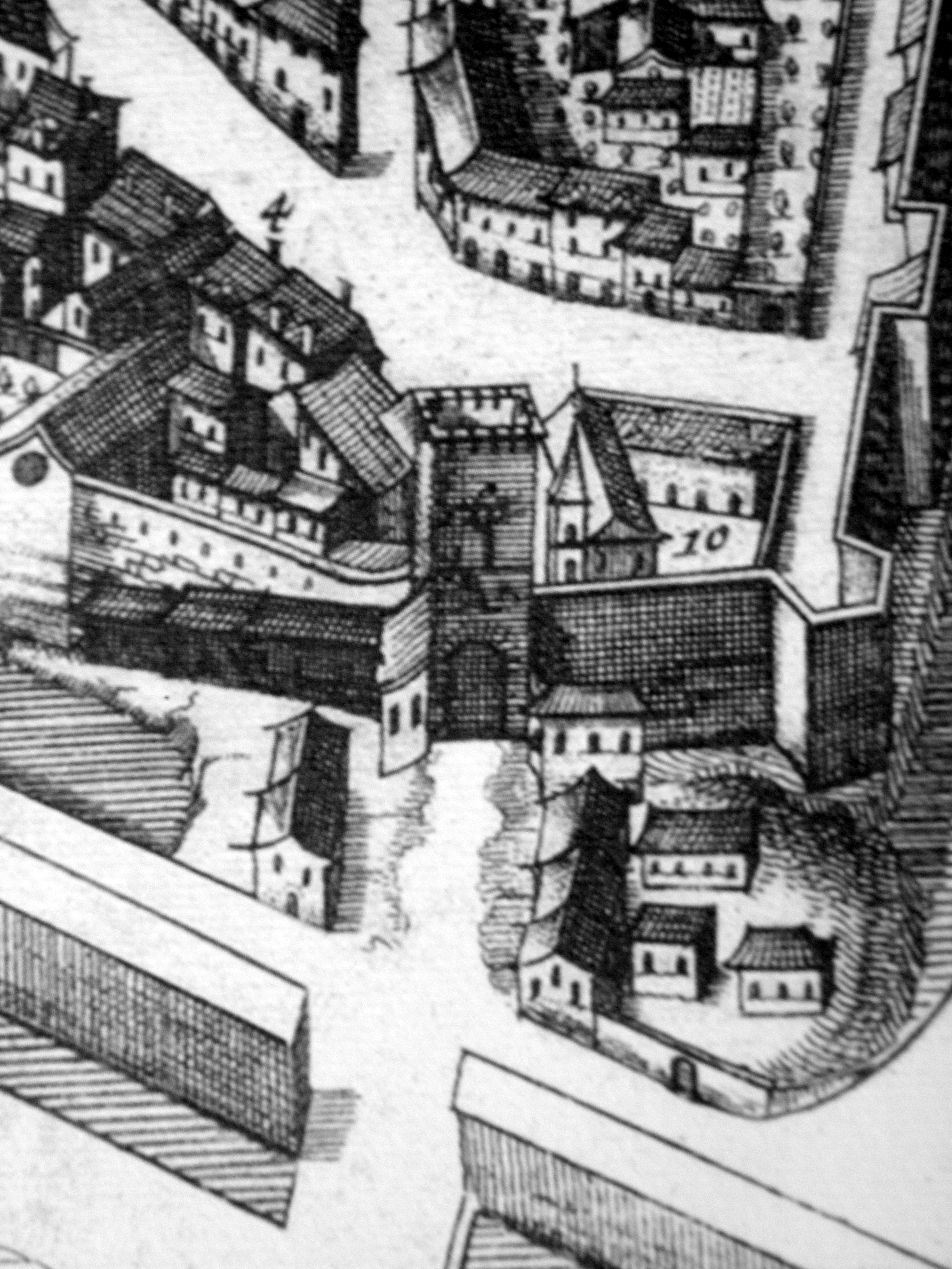 Pierre Mortier; antica mappa di Rovigo: dettaglio, la demolita Porta Arquà e parte degli edifici addossati alla parte sud della cinta muraria.